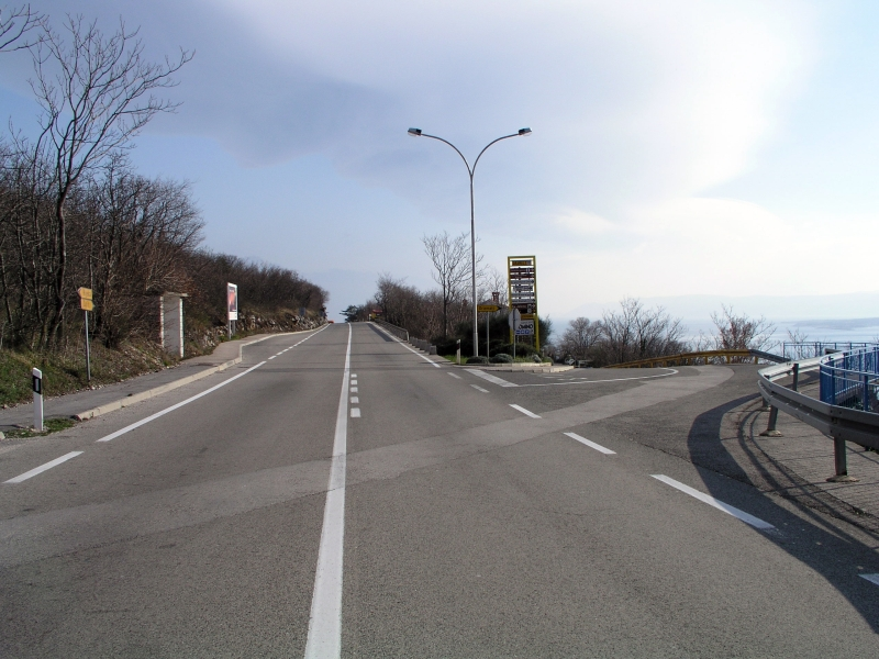 ulaz u Dramalj s Jadranske magistrale, Hrvatska